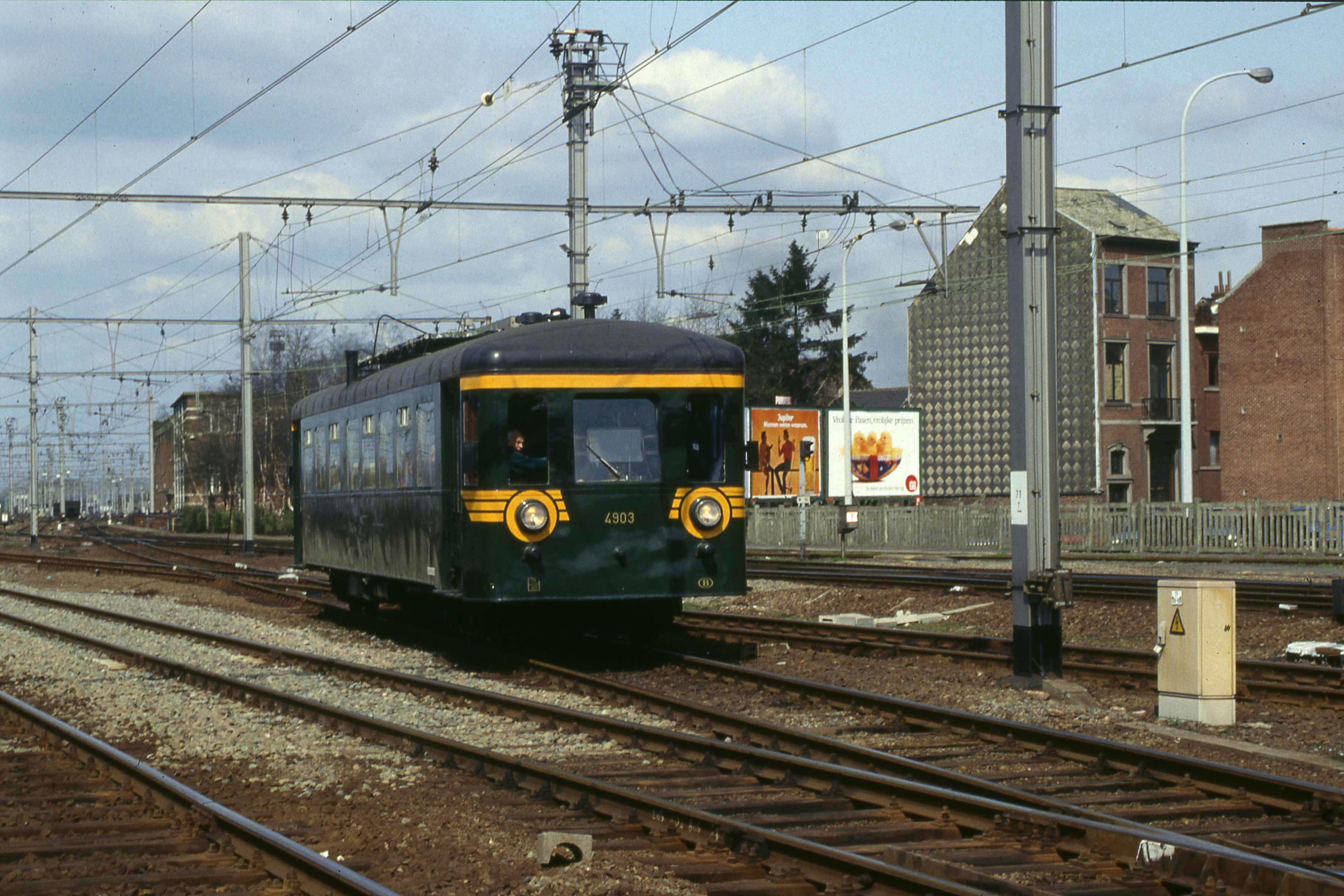 De 4903 railcar in Leuven (noordkant). Die werd nog gebruikt als werktrein.